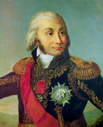 Le maréchal d'Empire Jean-Baptiste Jourdan posant aux côtés d'une pierre indiquant la route de Fleurus, où il remporta sa plus grande victoire. Copie d'après un original de Vien commandé par Napoléon Ier pour la salle des maréchaux du palais des Tuileries à Paris, détruit dans l'incendie de 1871